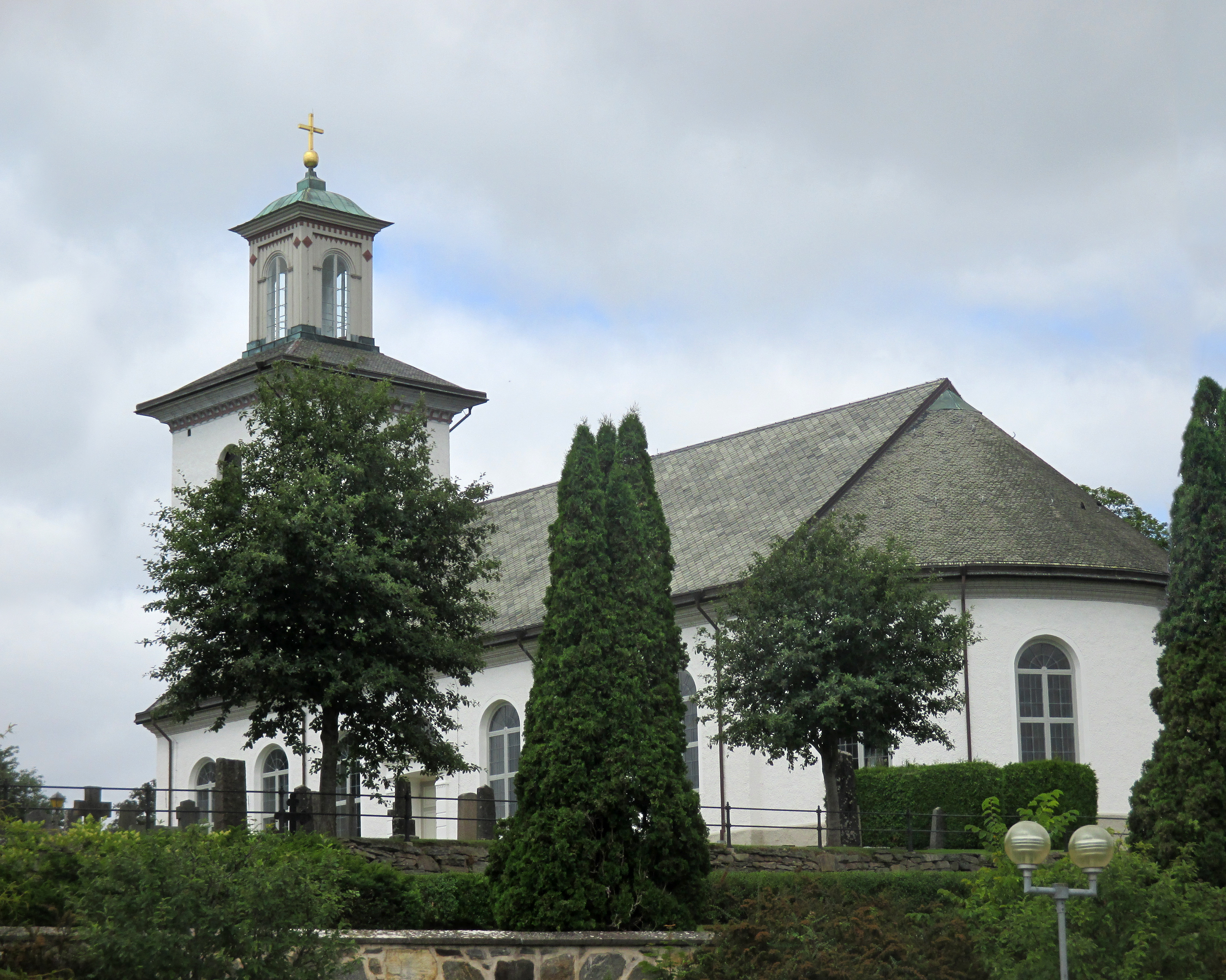 Bredaryds kyrka sedd från Storgatan i Bredaryd, Värnamo kommun, Jönköpings län, Småland, Sverige.